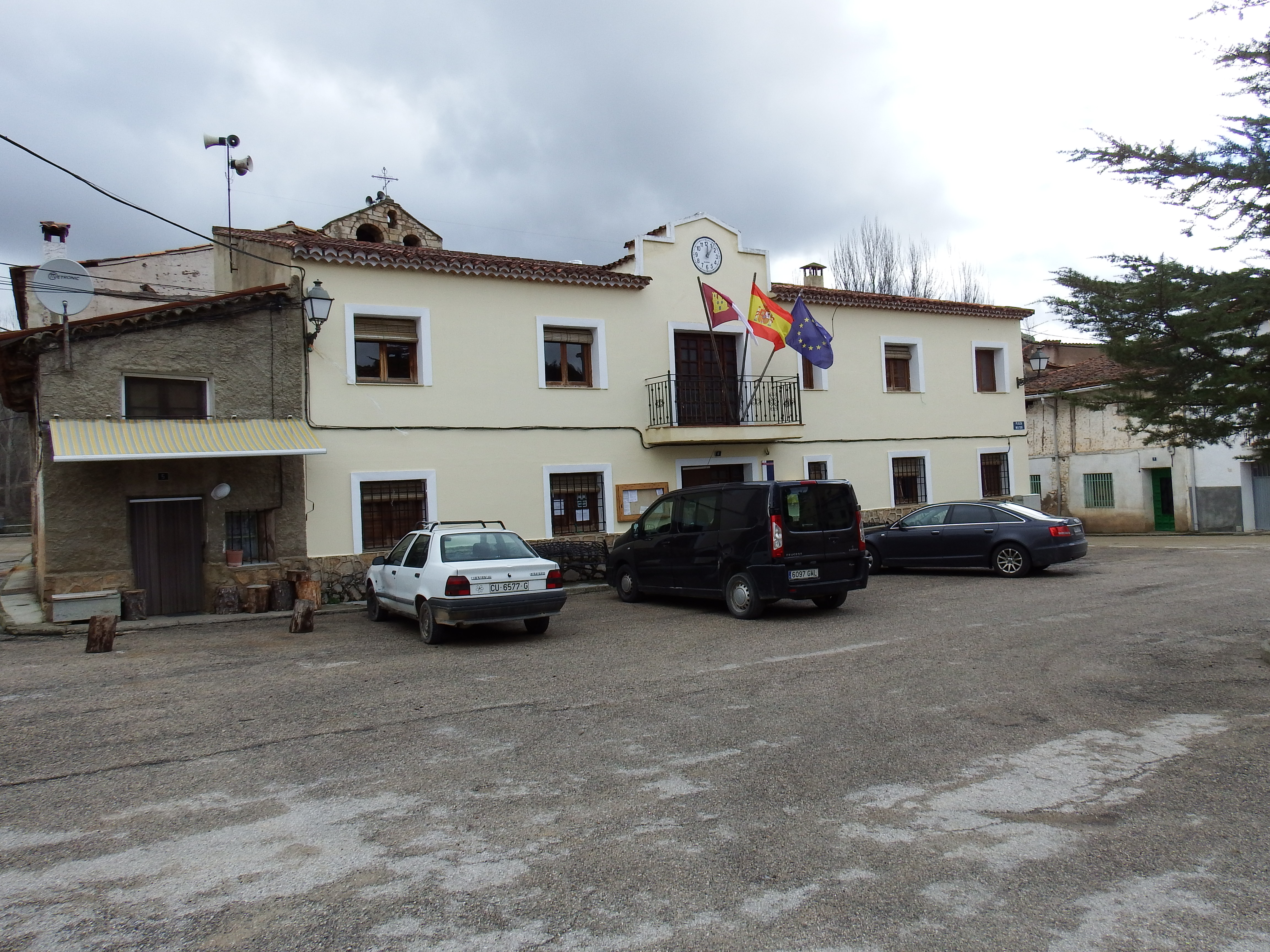 Ayuntamiento